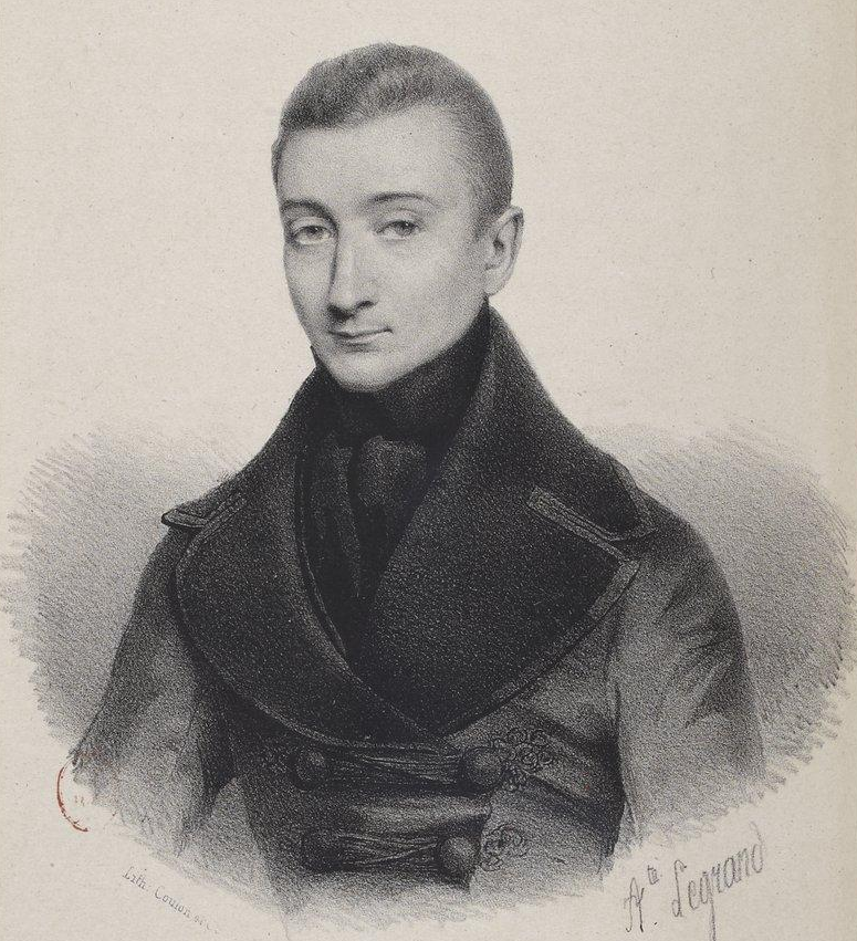 Xavier Forneret - 1840